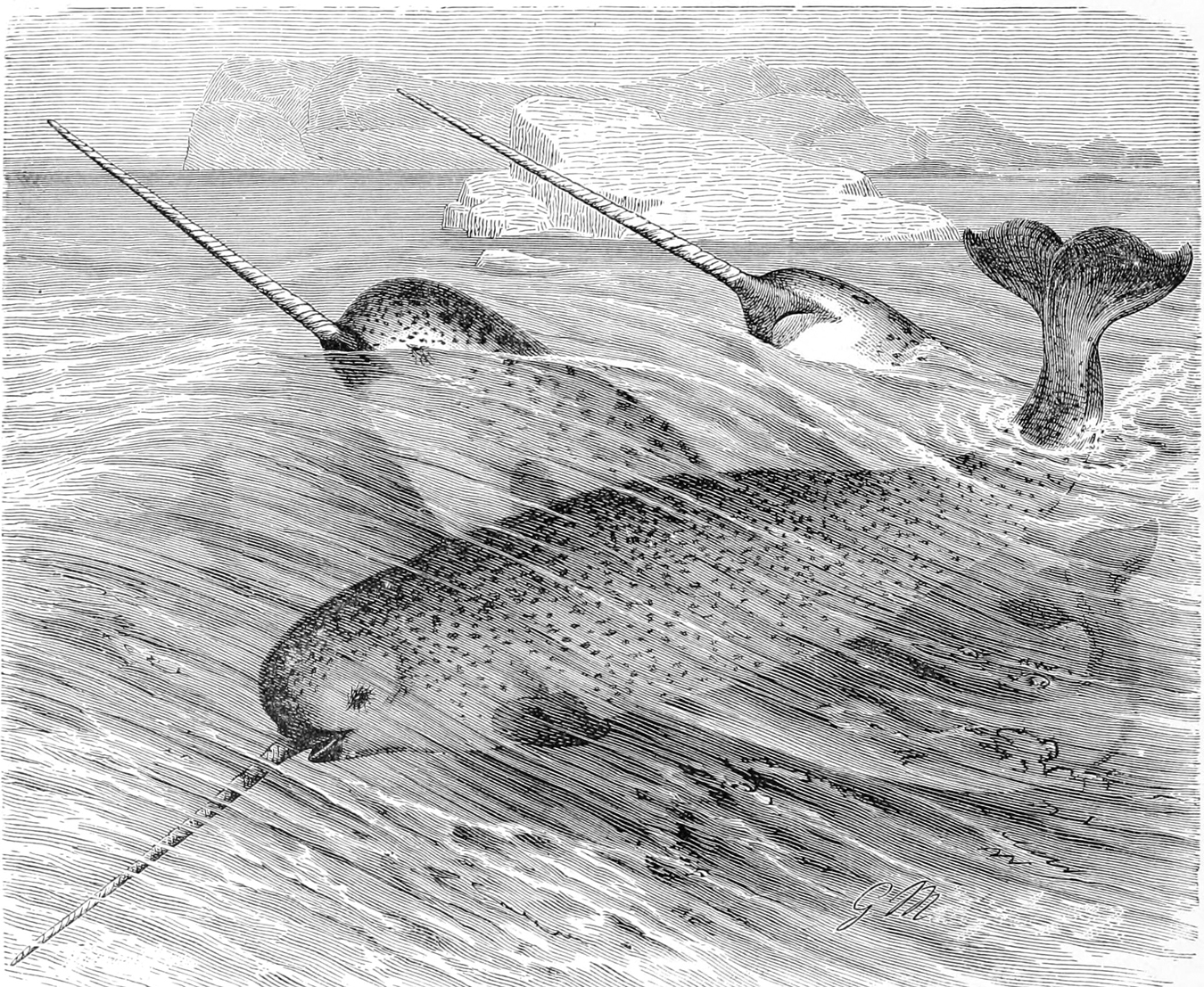 Monodon monoceros